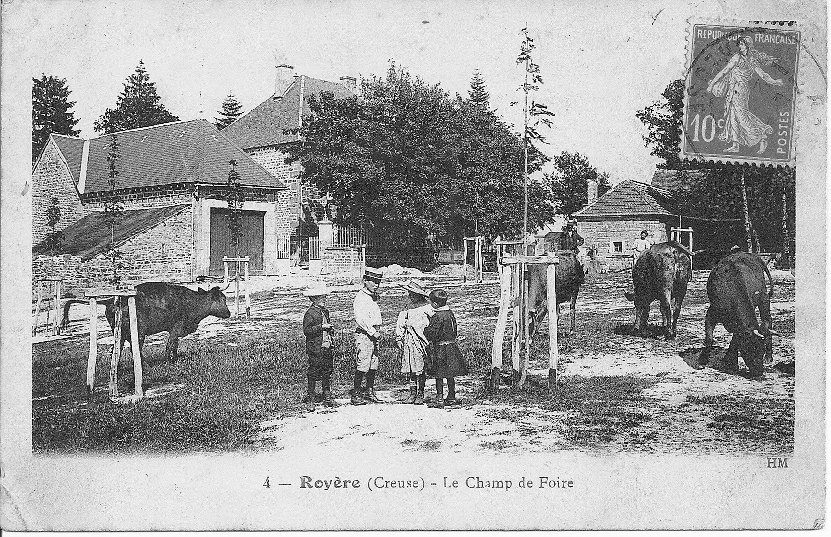 Champs de foire Royère Collection personnelle